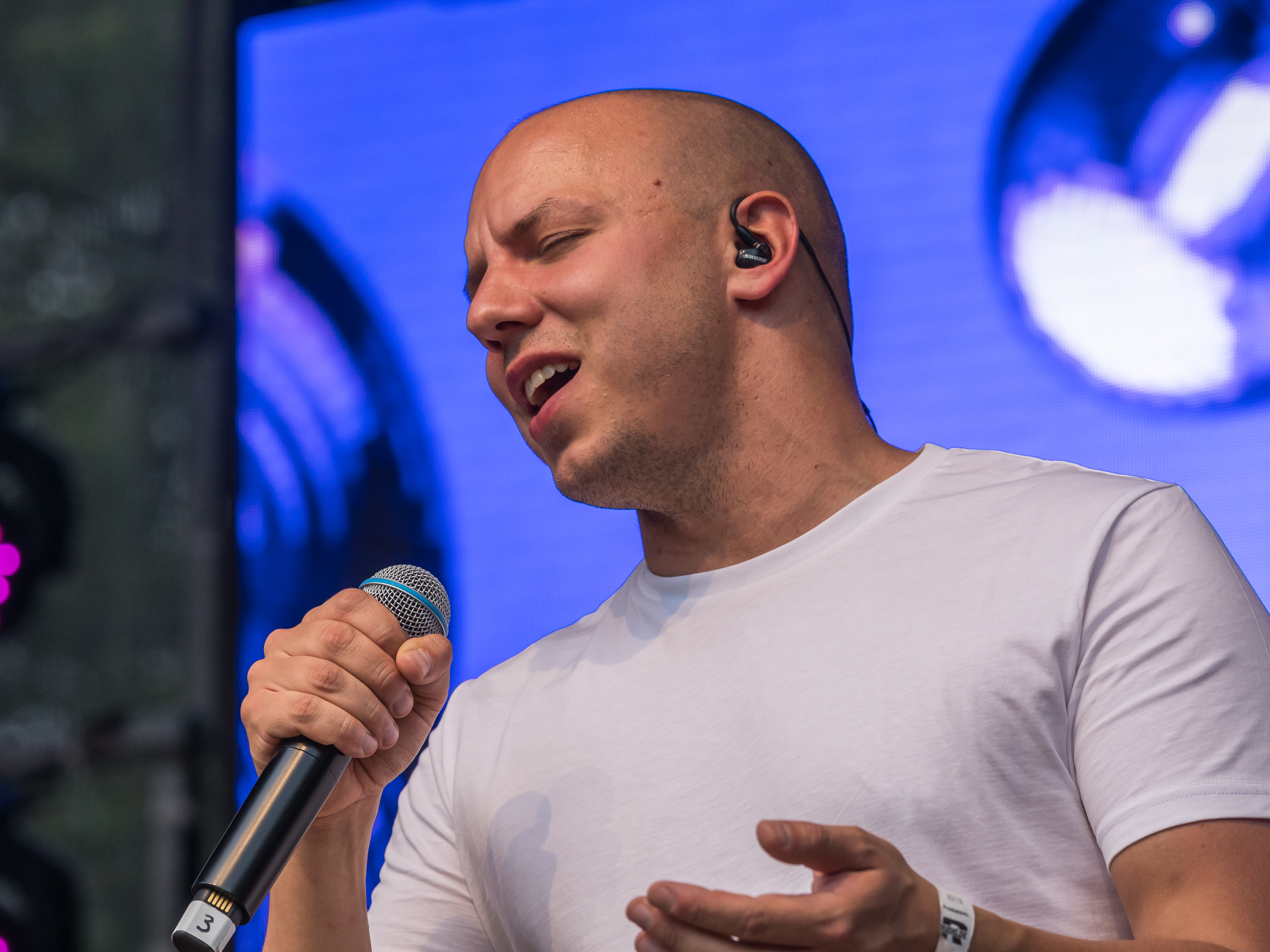 ColognePride 2019-Samstag-Hauptbühne-1850-KEiiNO